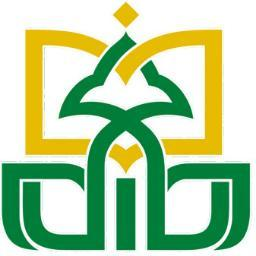 Logo IAIN Jember